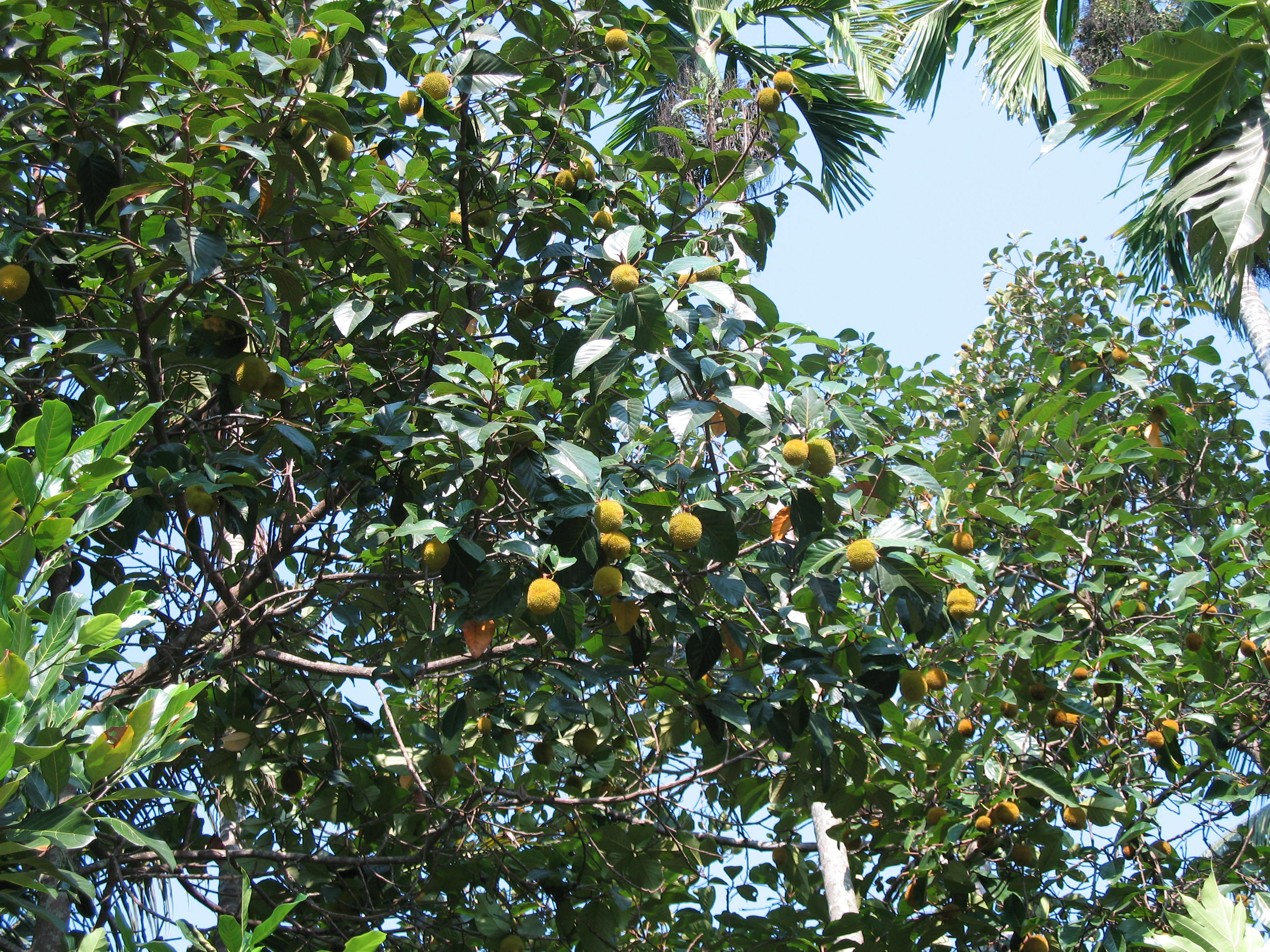 ചള്ളിയാൻറെ അളിയൻറെ വീട്ടിലെ